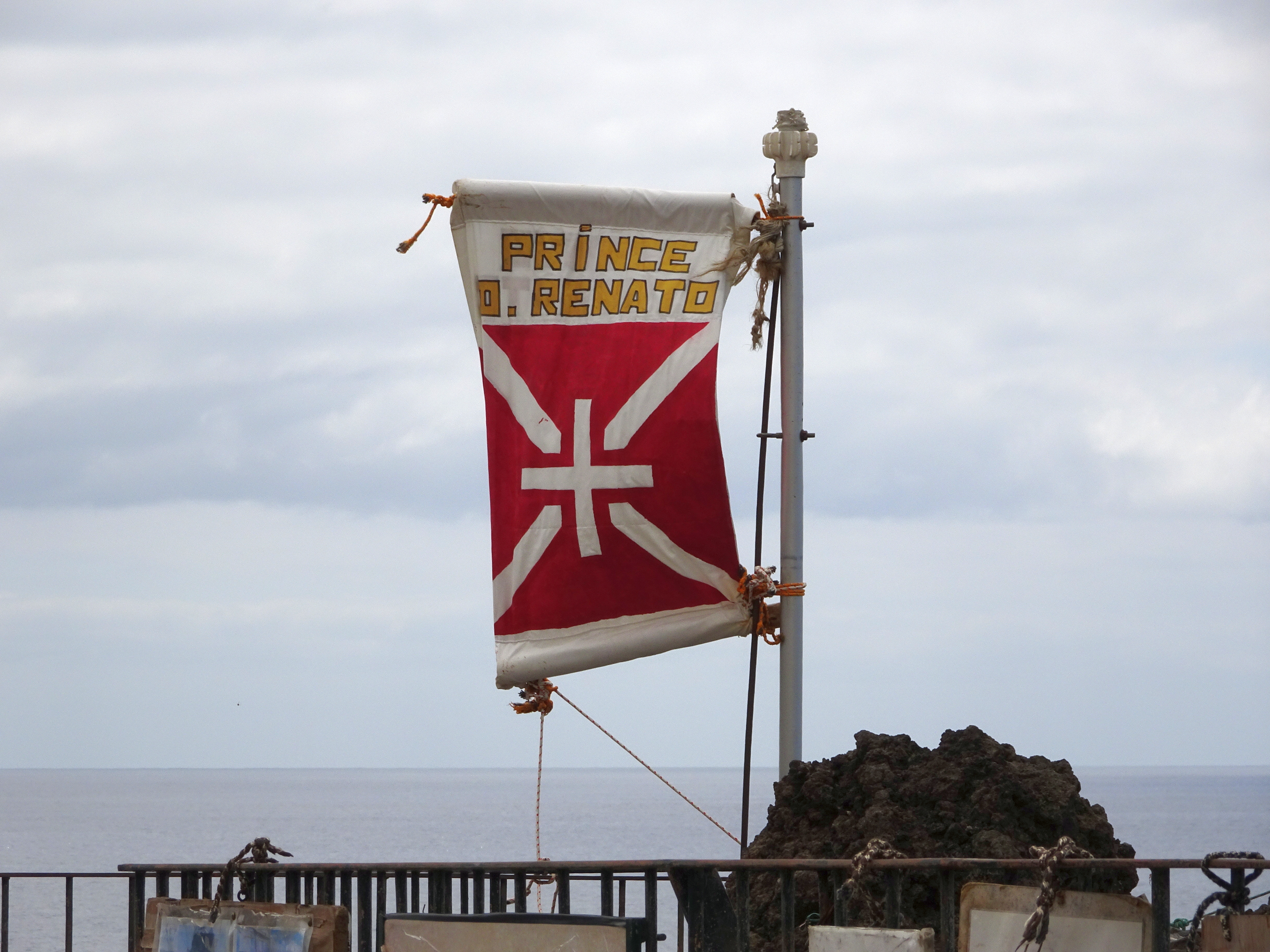 Flagge auf der Aussichtsplattform des Fürstentums Pontinha vor Funchal, Madeira